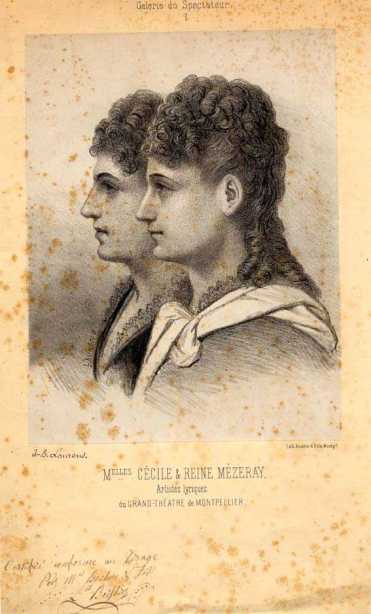 Une planche pour la Galerie du spectateur, à Montpellier, impr. Boehm, 1874. Cécile et Reine Mézeray, artistes lyriques du Grand Théâtre de Montpellier, d'après Jules Laurens (Inventaire du fonds français après 1800, Bibliothèque nationale, Département des estampes. Tome treizième, Laurencin-Lépagnez / par Jacques Lethève, Françoise Gardey et Jean Adhémar.)